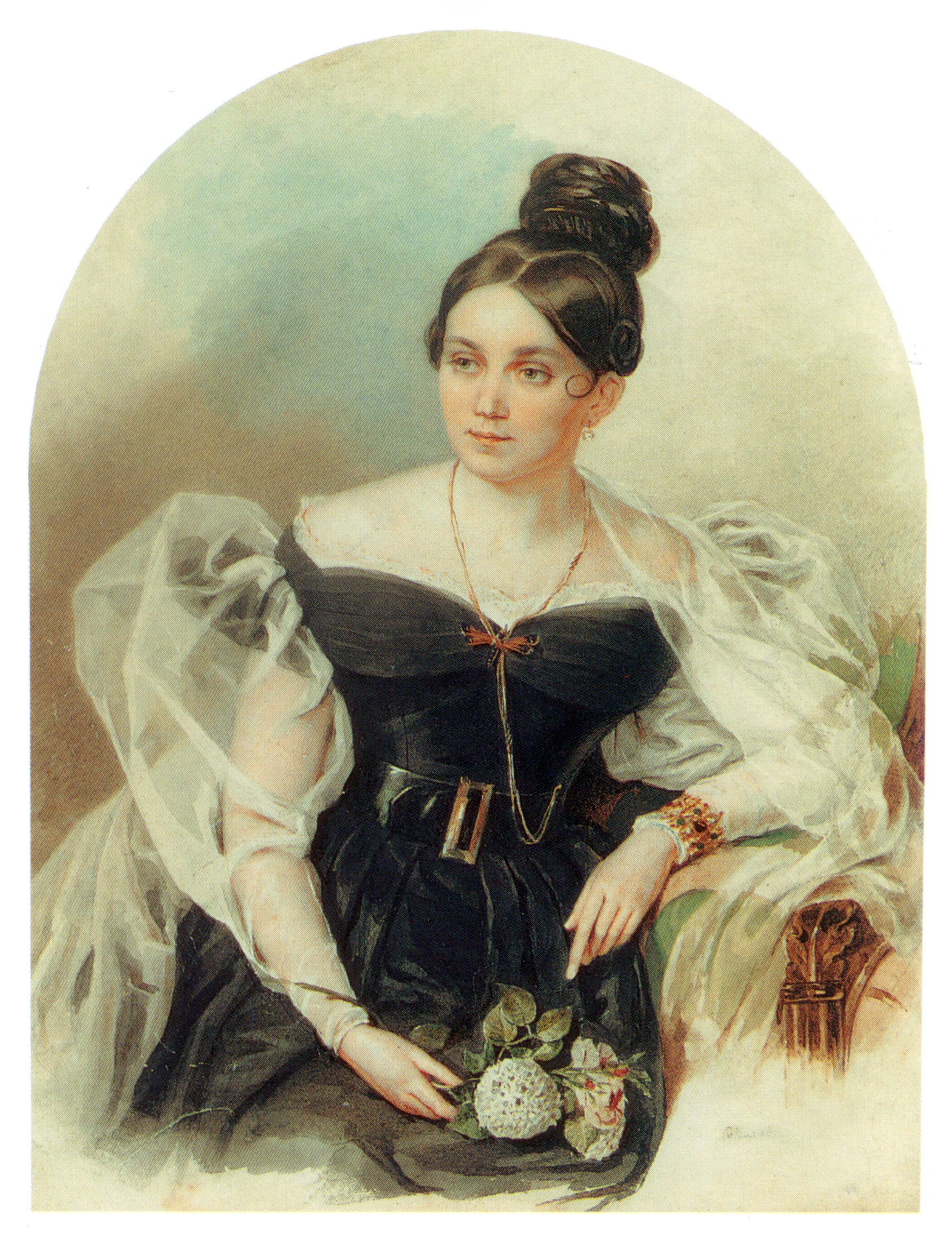 Елена Григорьевна Черткова(1800-1832), дочь барона Г.А.Строганова